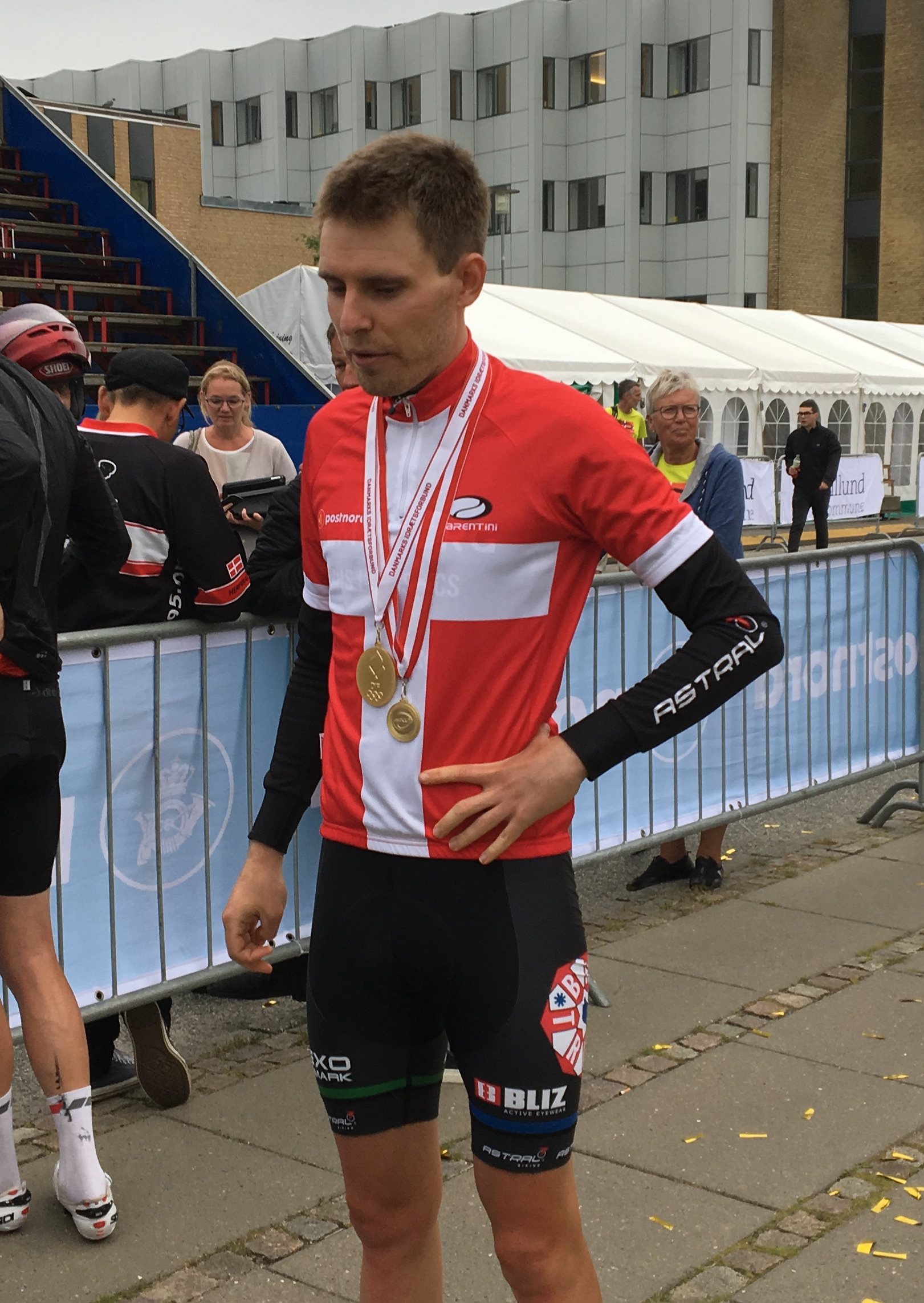 Martin Toft Madsen efter at have vundet DM i enkeltstart 2017